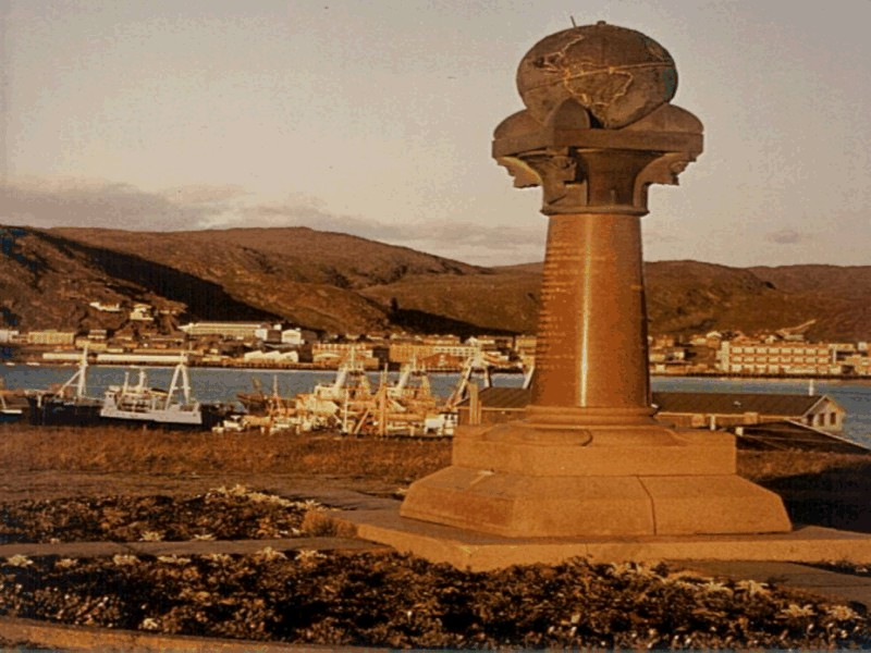 Hammerfest, Meridianmonument Fotograf: presse03, selbst erstellt, 1975 Lizenz: GNU-FDL